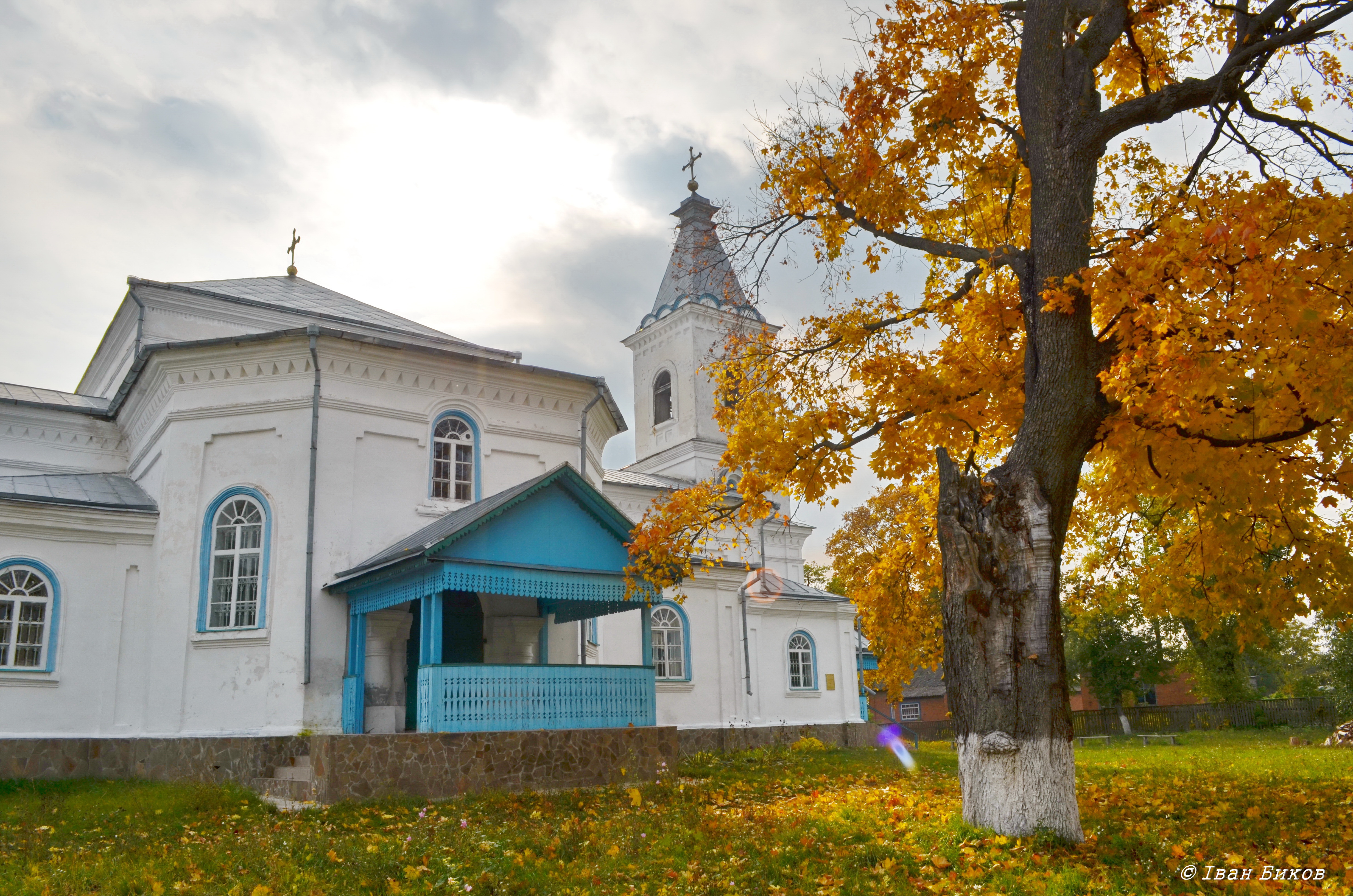 Миколаївська церква, с. Вертіївка